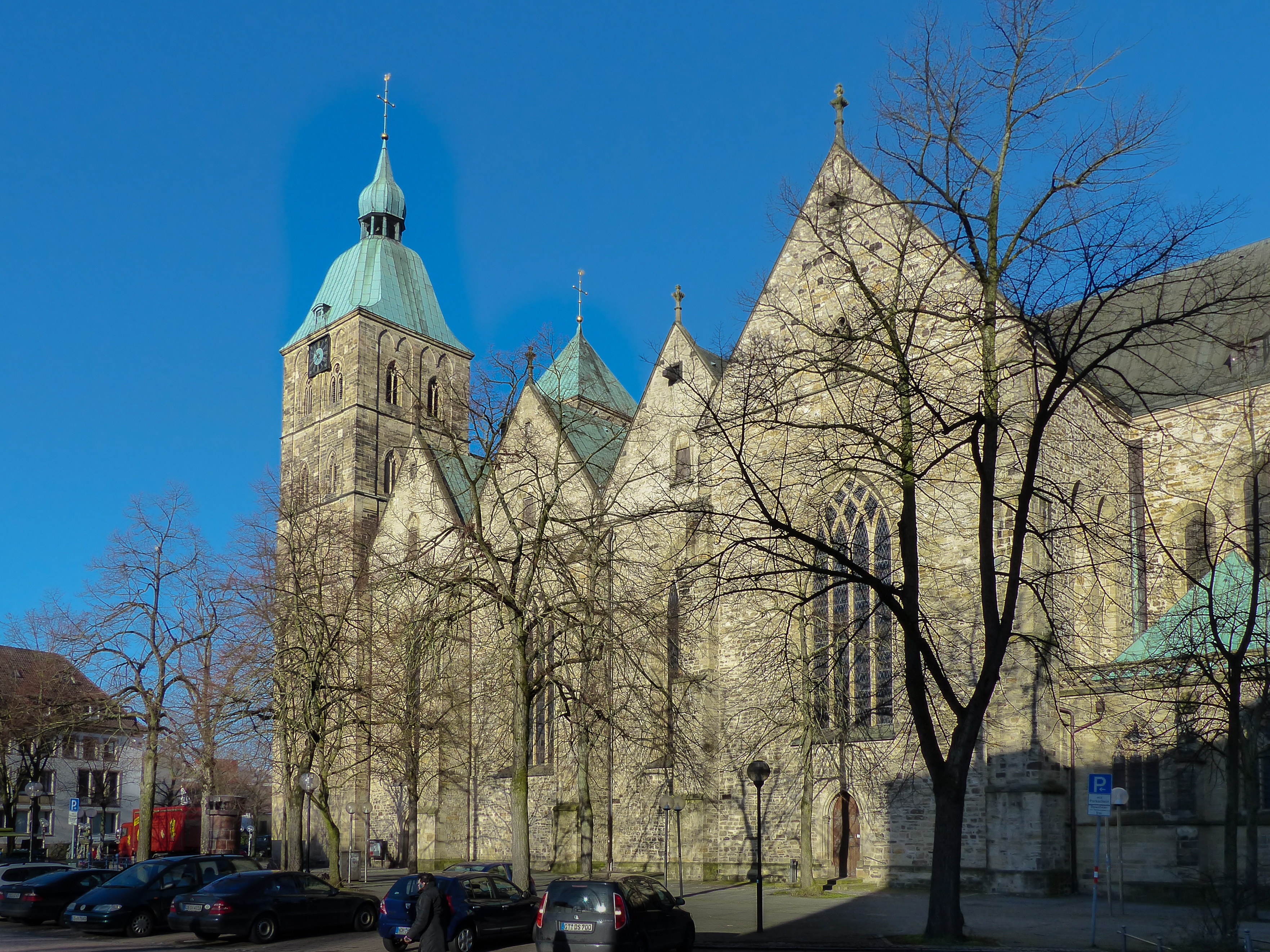 Osnabrück, St. Johann